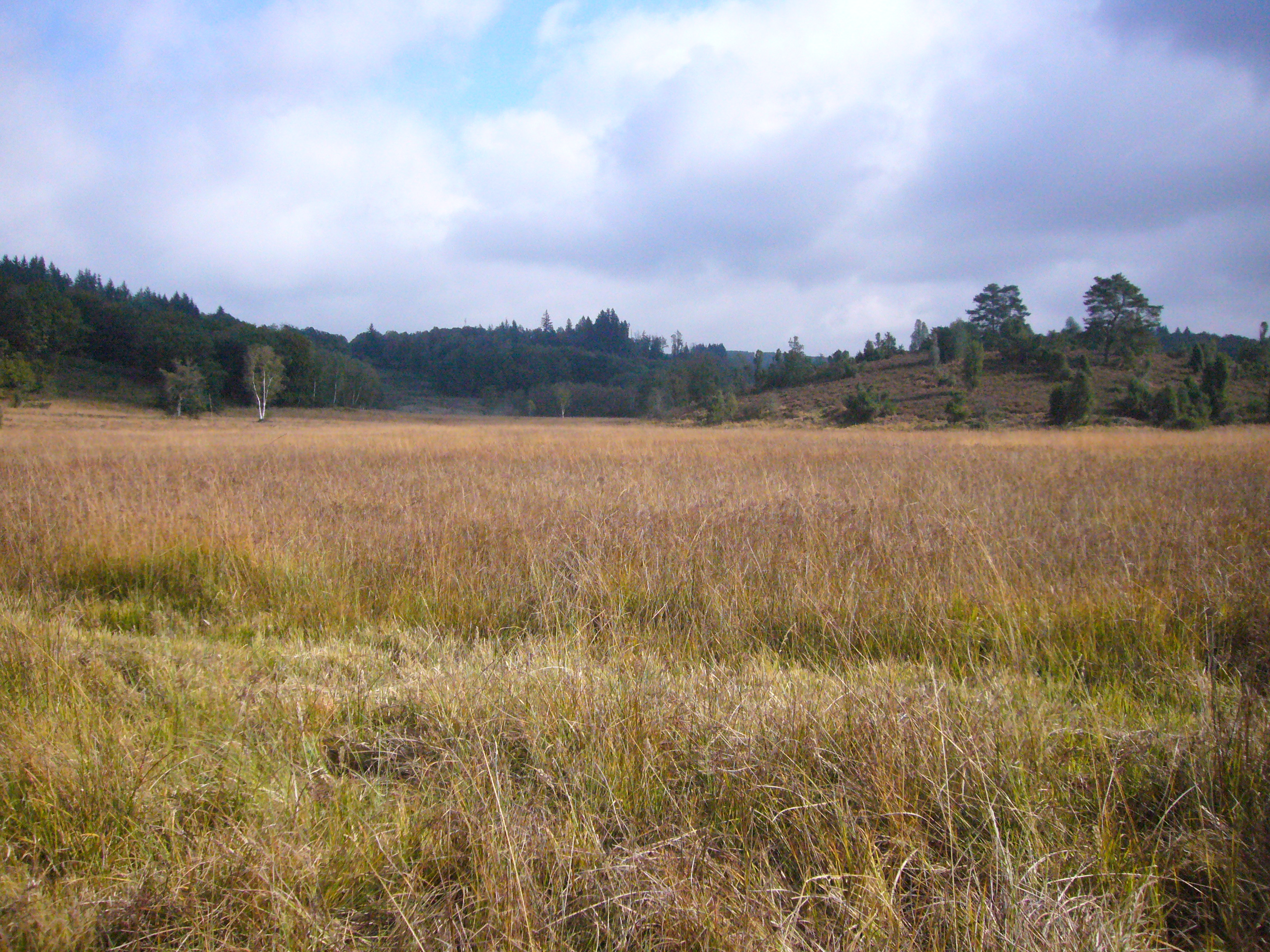 Réserve naturelle nationale de la tourbière des Dauges, Haute-Vienne, France